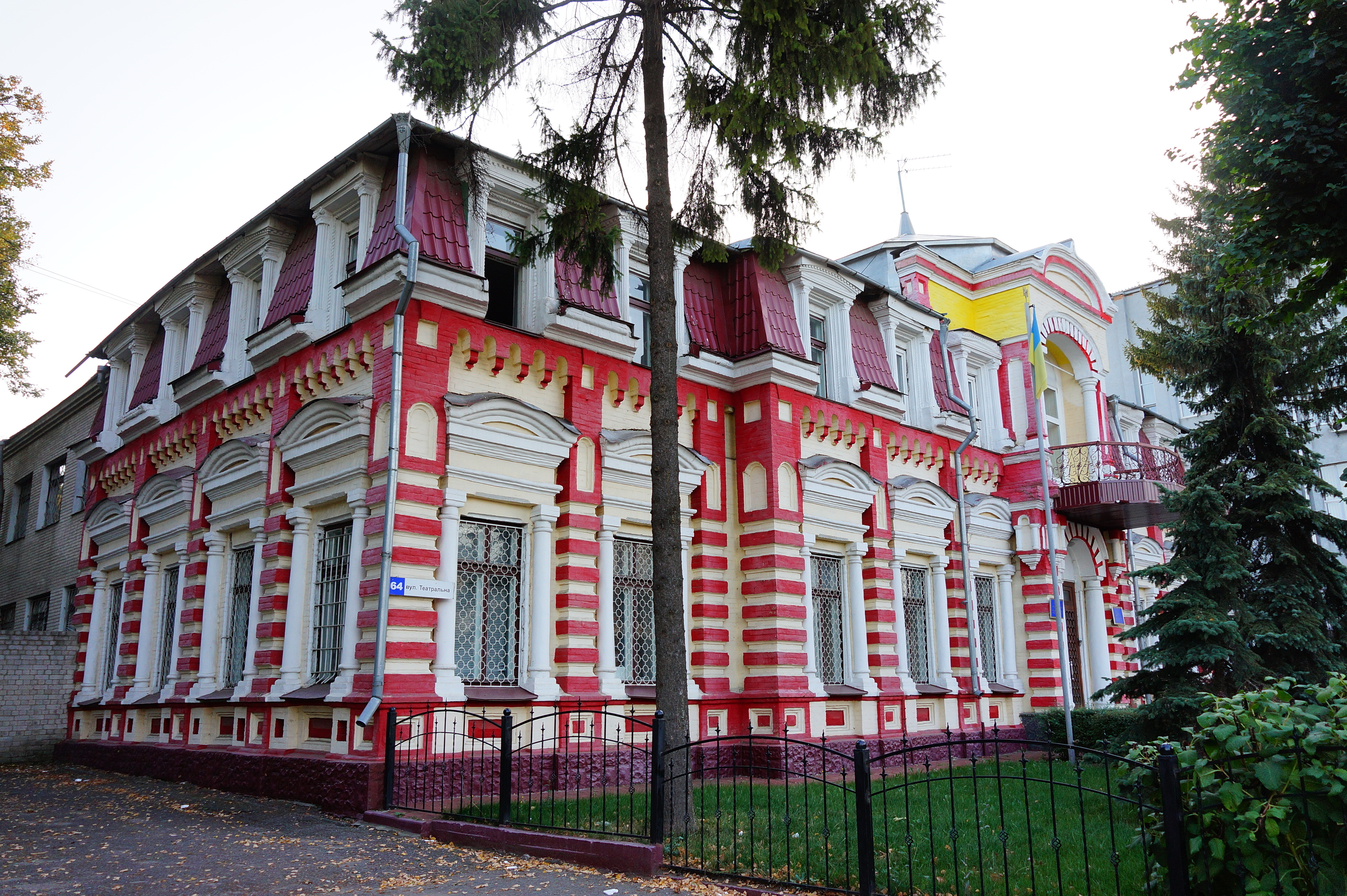 Особняк (мур.), Хмельницький, вул. Героїв Майдану, 64